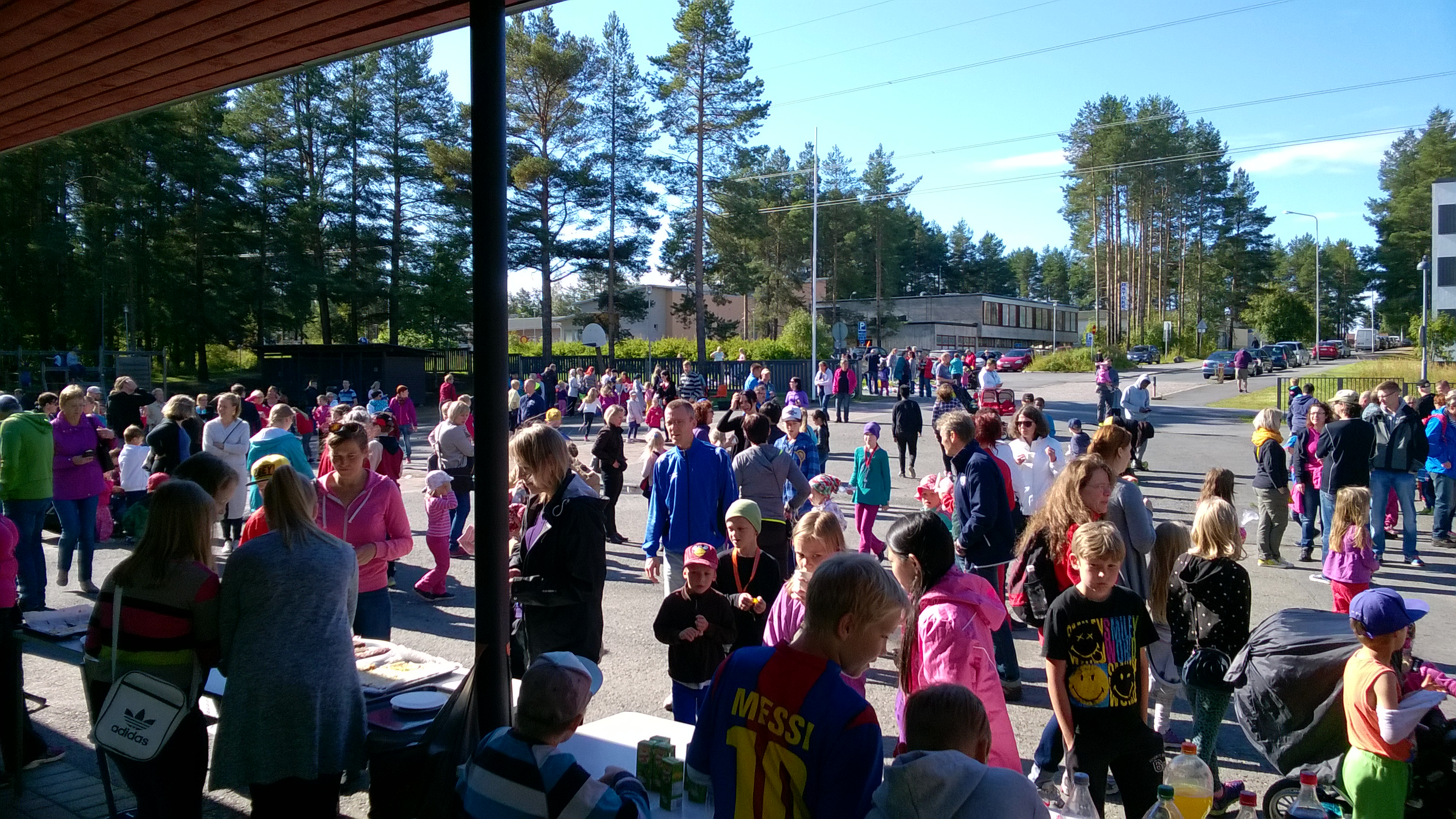 Oulun normaalikoulun Koskelan yksikön pihatapahtuma 2015